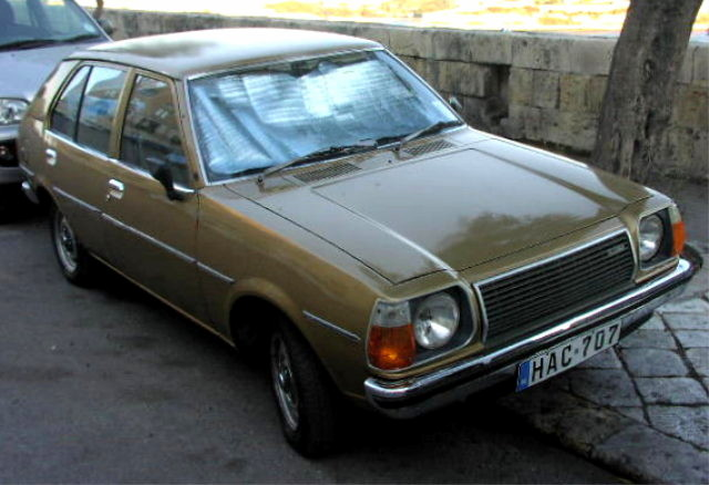 Mazda 323 1st Generation